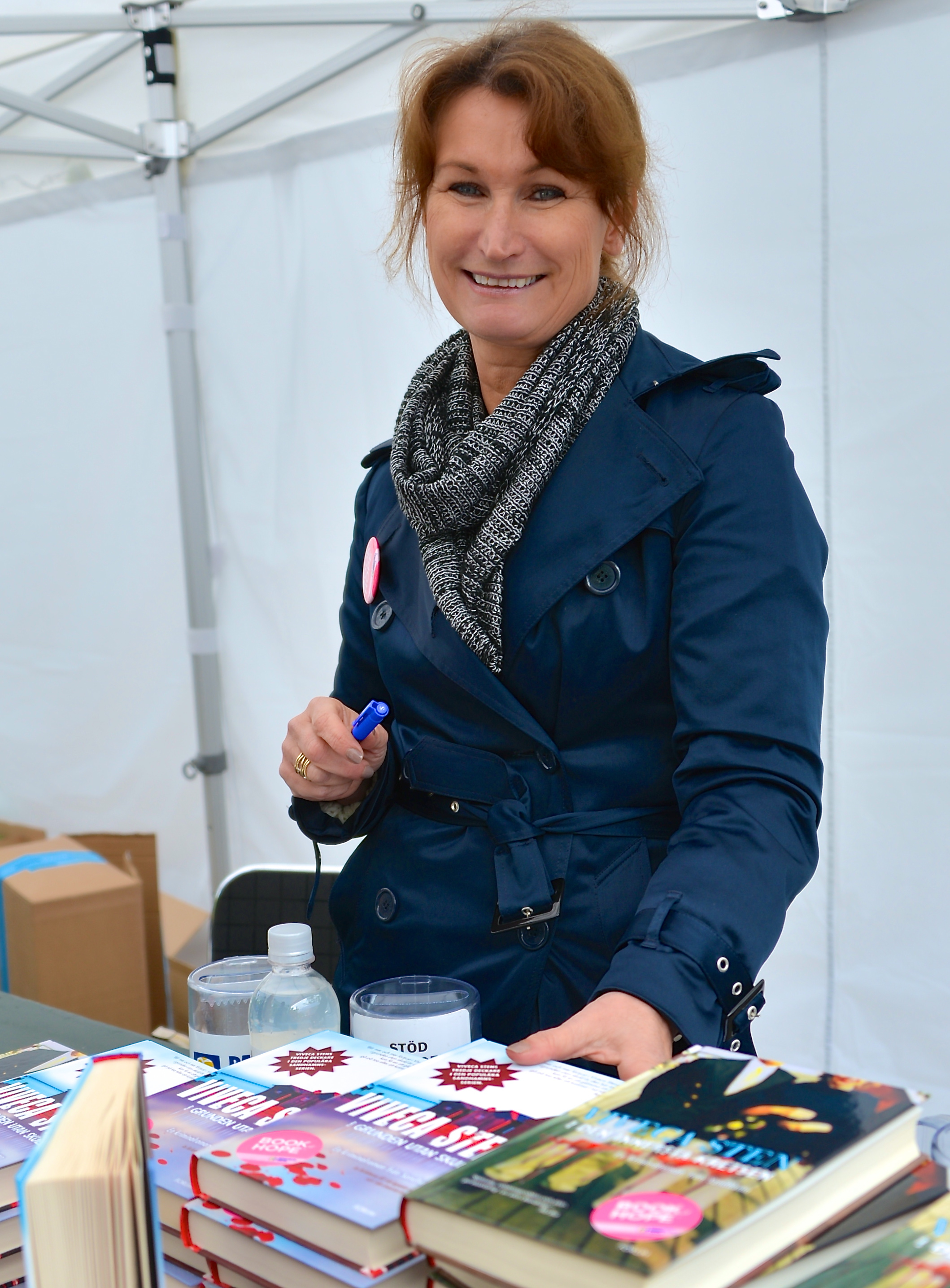 Viveca Sten i Kungsträdgården i Stockholm den 22 maj 2013 i samband med kampanjen Book of Hope för Barncancerfonden.